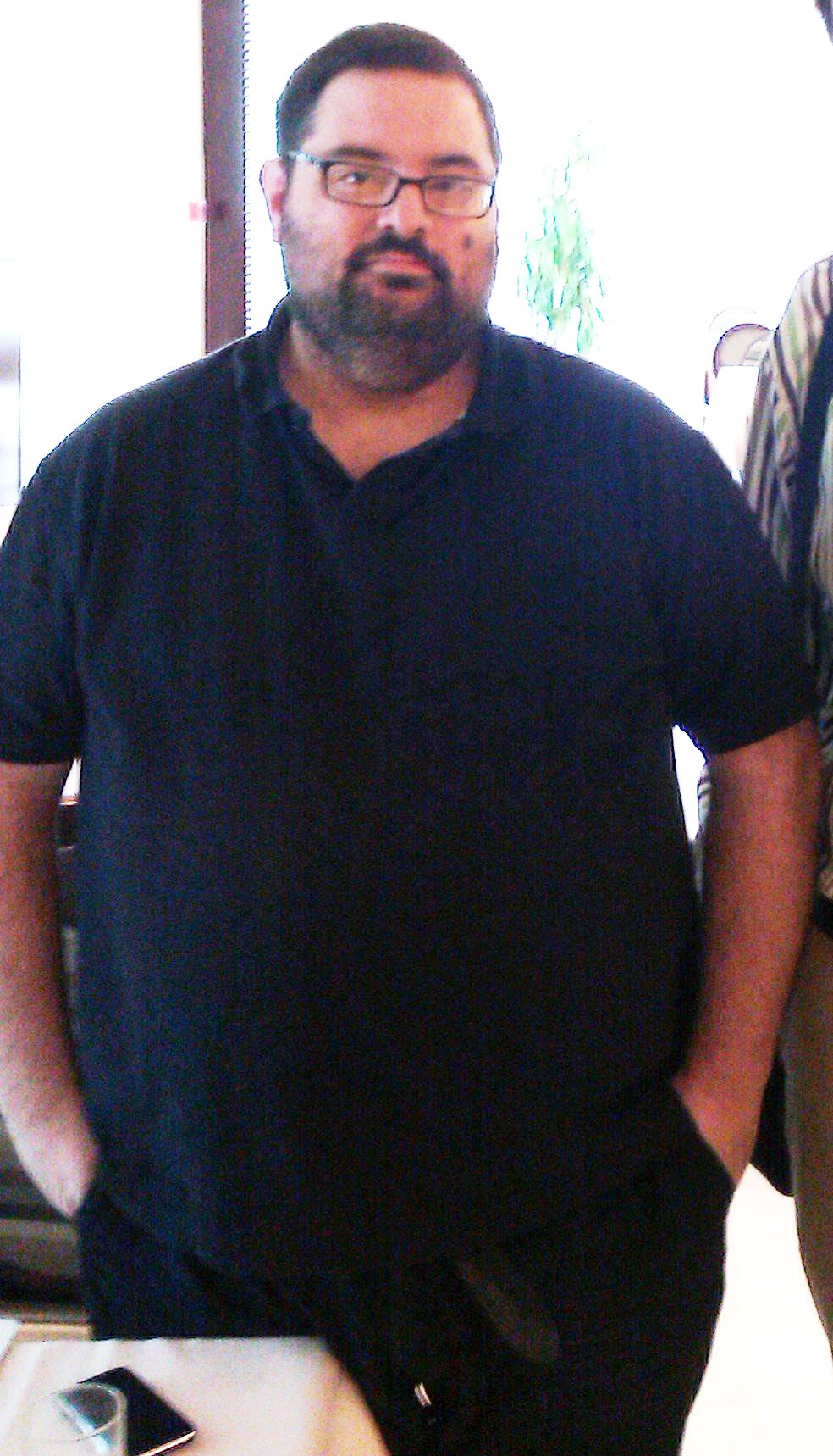 Stéphane M. Grueso, autor de "¡Copiad Malditos!"